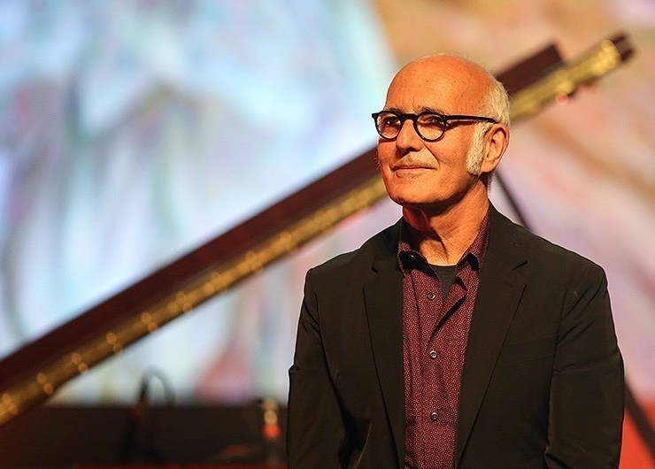 کنسرت لودویکو ایناودی